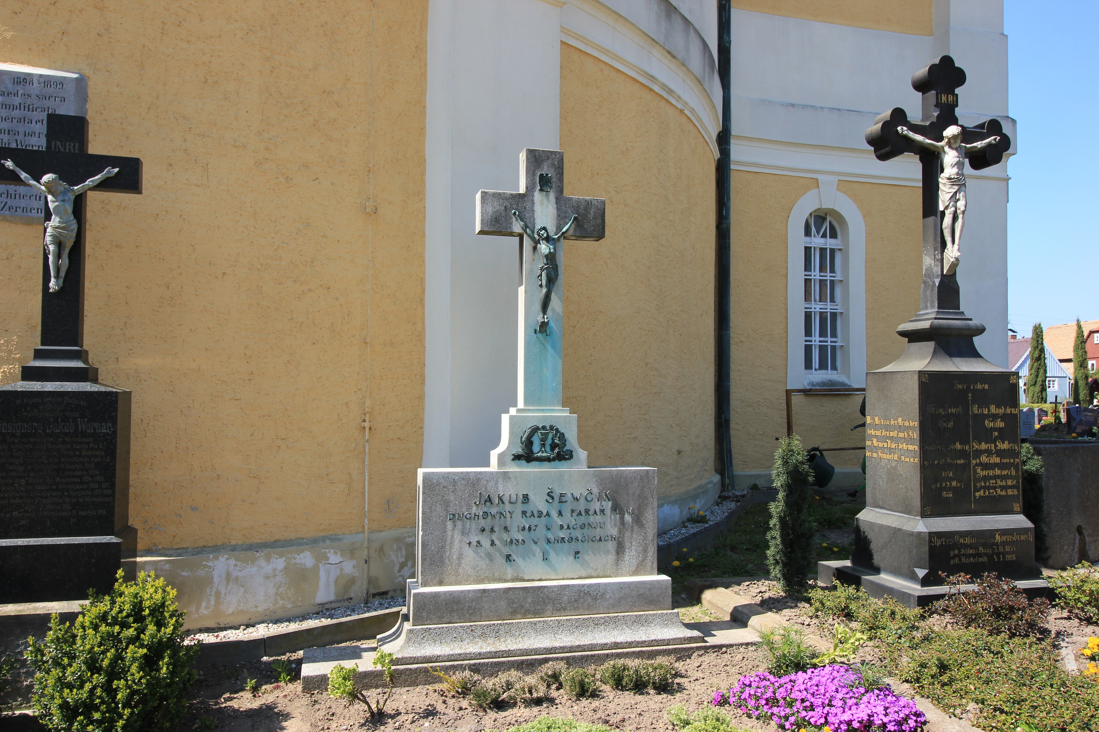 Hornjoserbsce: Narowny pomnik Jakuba Šewčika na Chróšćanskim kěrchowje